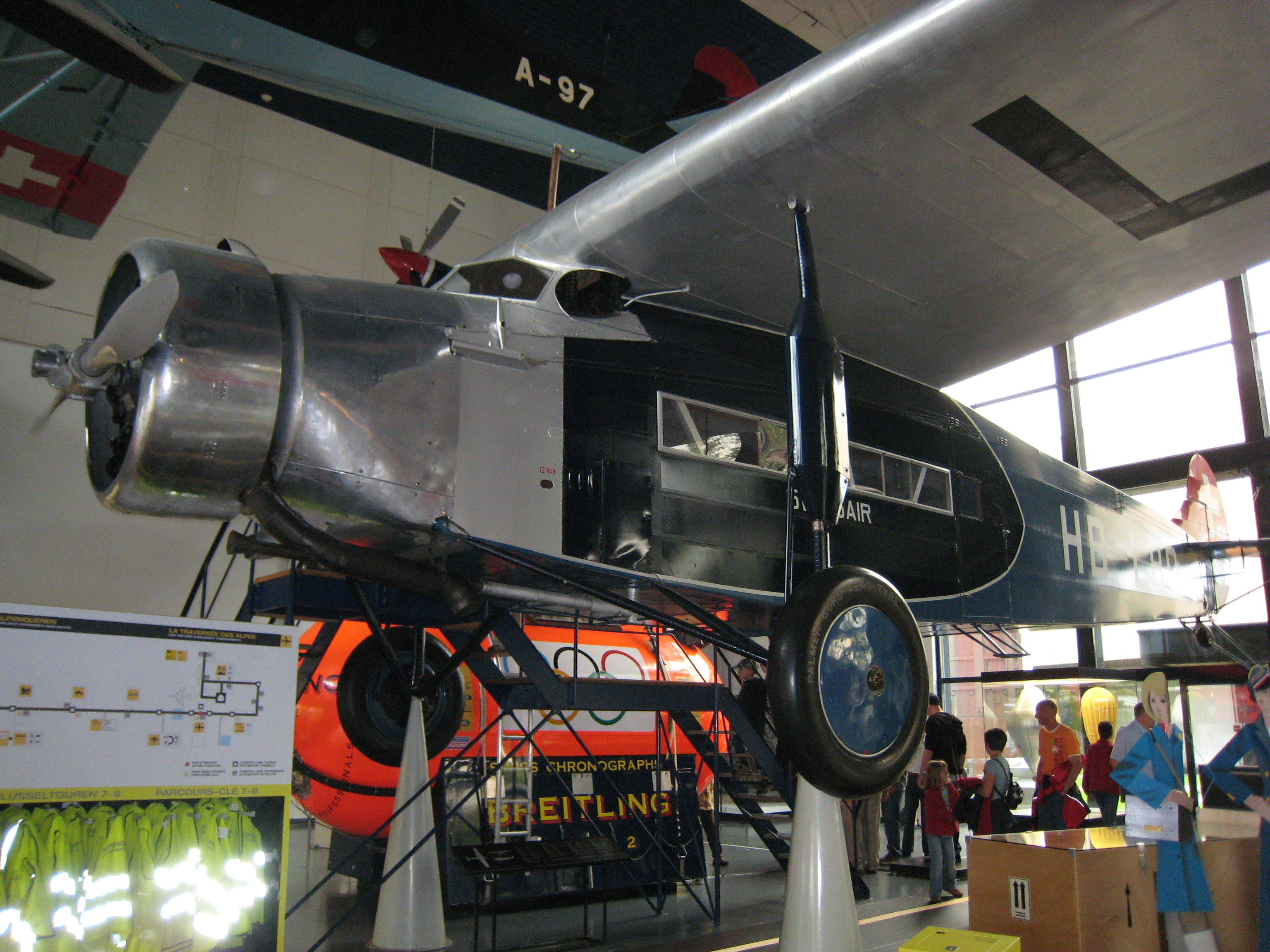 Fokker F.VIIa der Swissair im Verkehrshaus